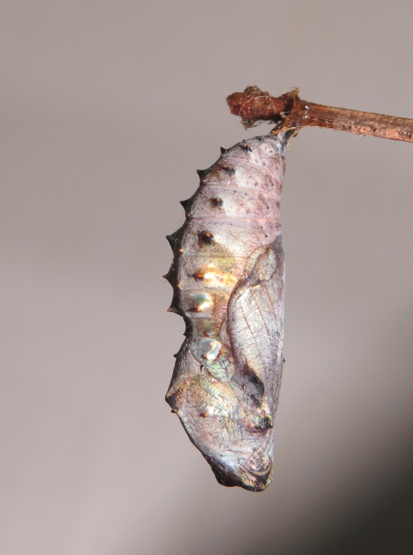 Photos taken at Mannavan Shola, Anamudi Shola National Park, Kerala